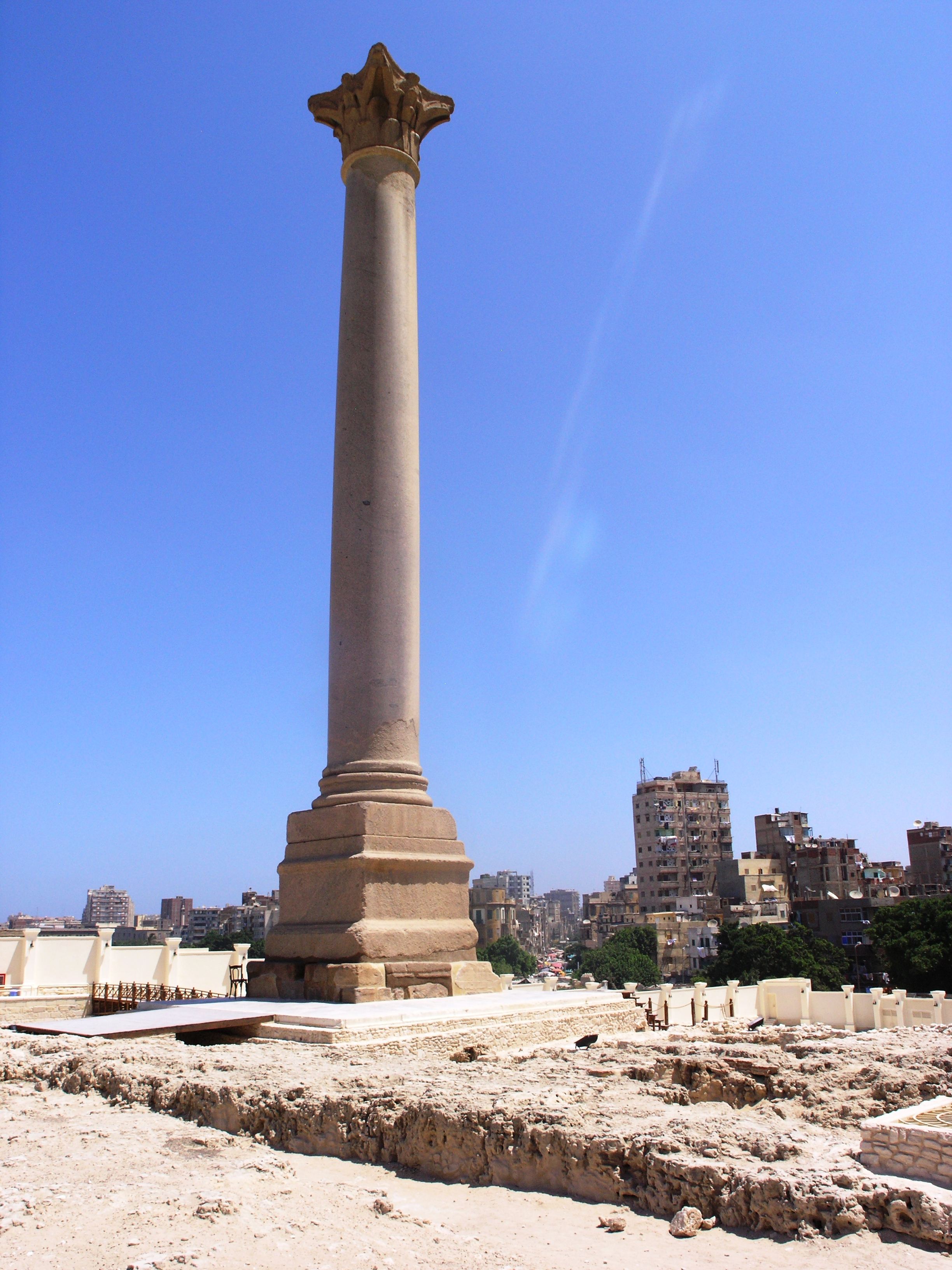 Alexandria - Pompey's Pillar